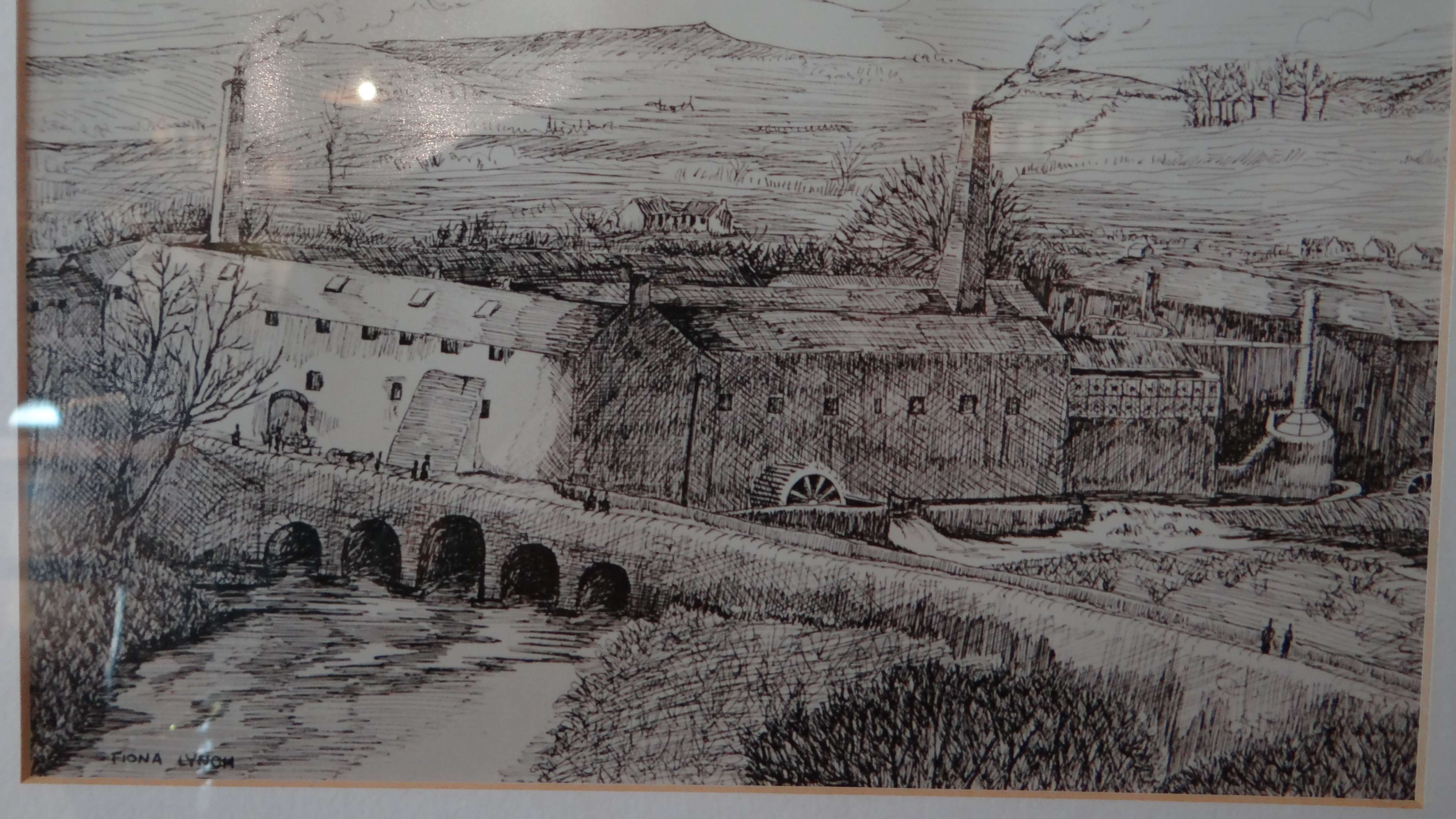 Distillerie de Kilebeggan